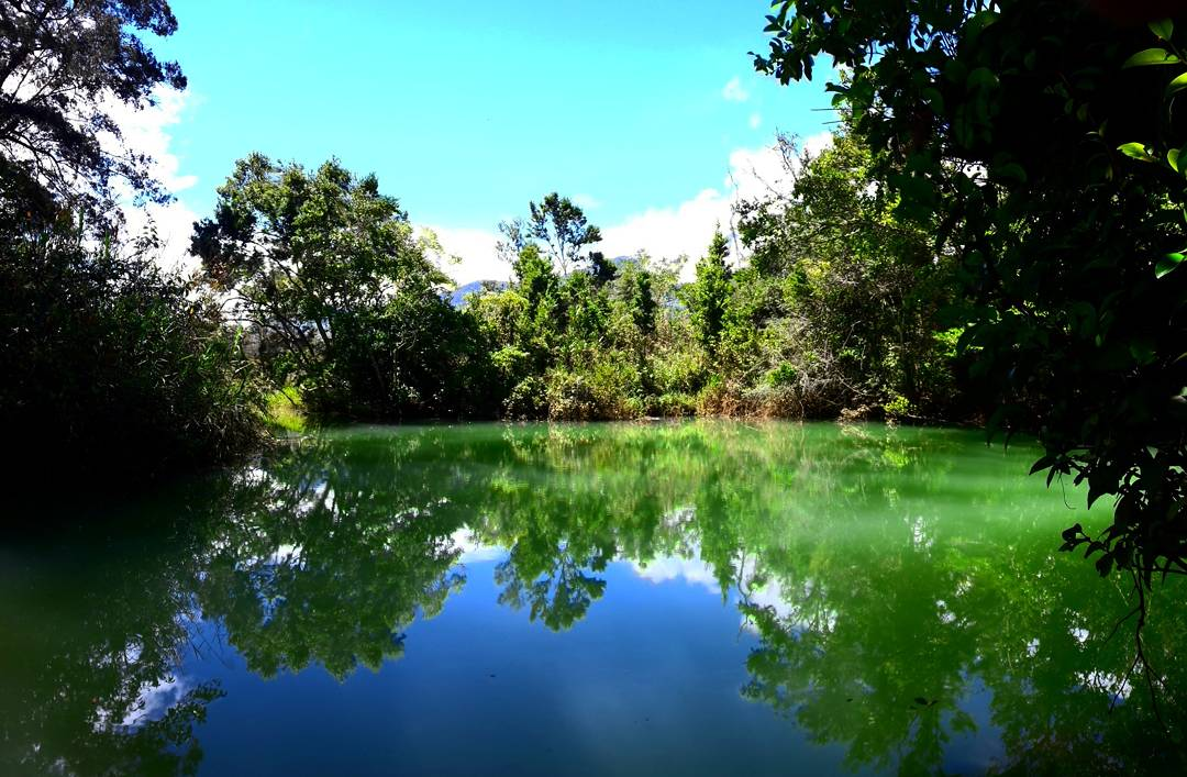 Telaga Biru Wamena